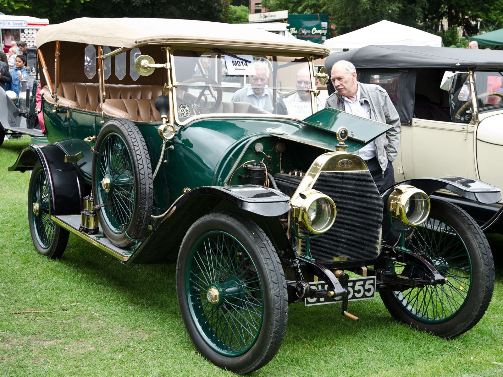 1913 S.C.A.T. torpedo Hebden Bridge Vintage Weekend 04/08/2013